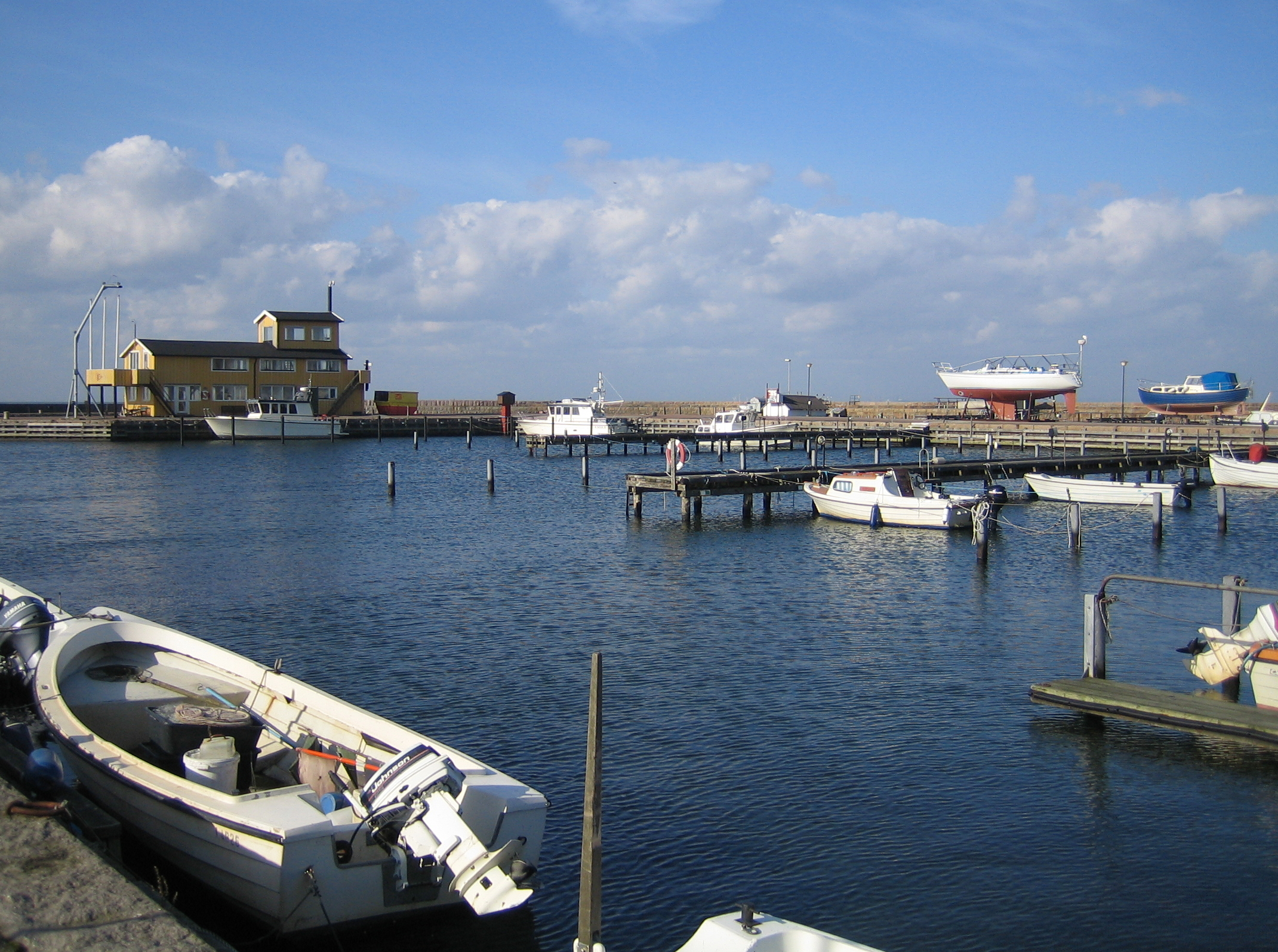 Barsebäckshamn in Skåne, Sweden